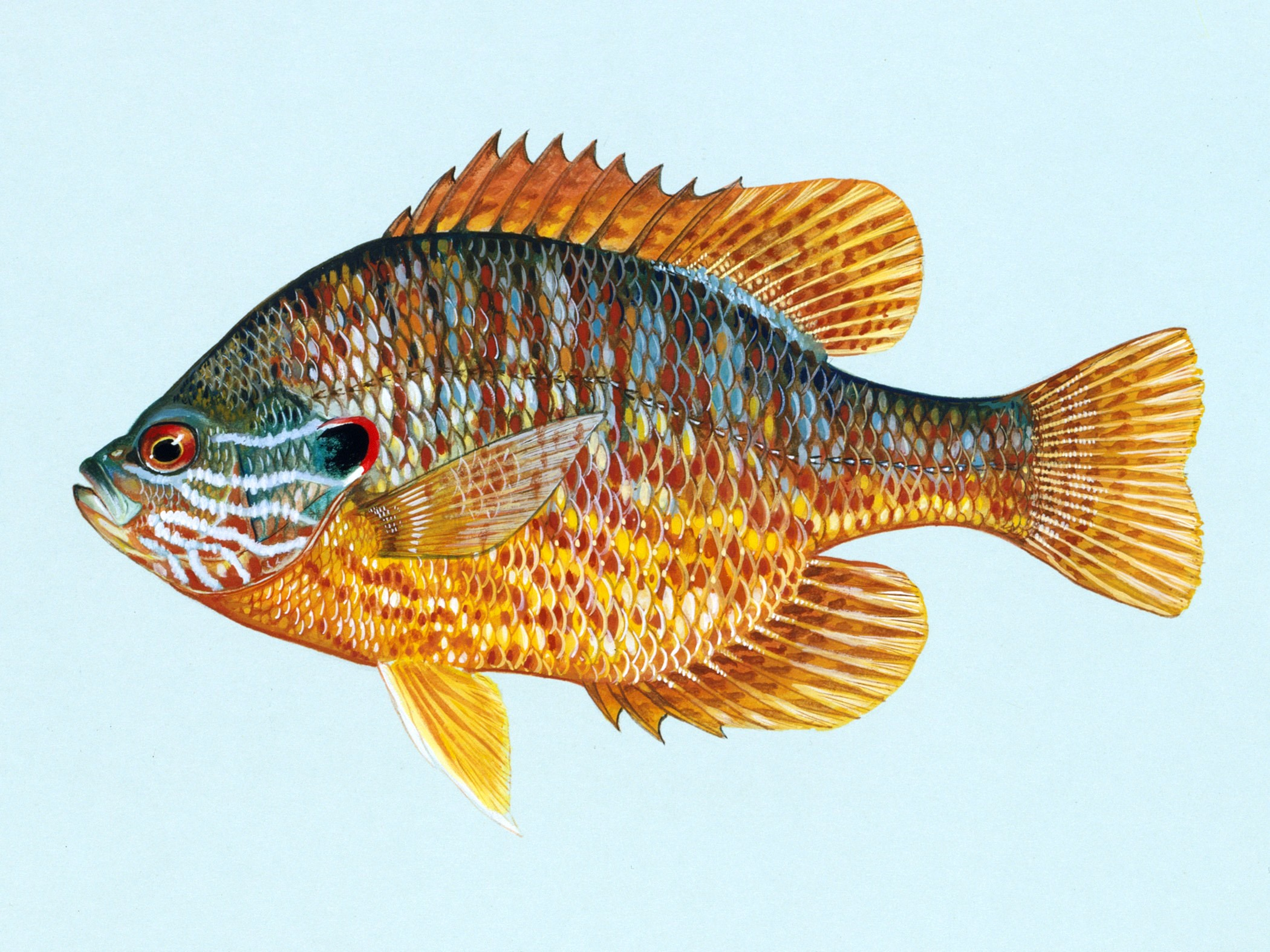 Lepomis gibbosus (Actinopterygii: Perciformes: Centrarchidae)